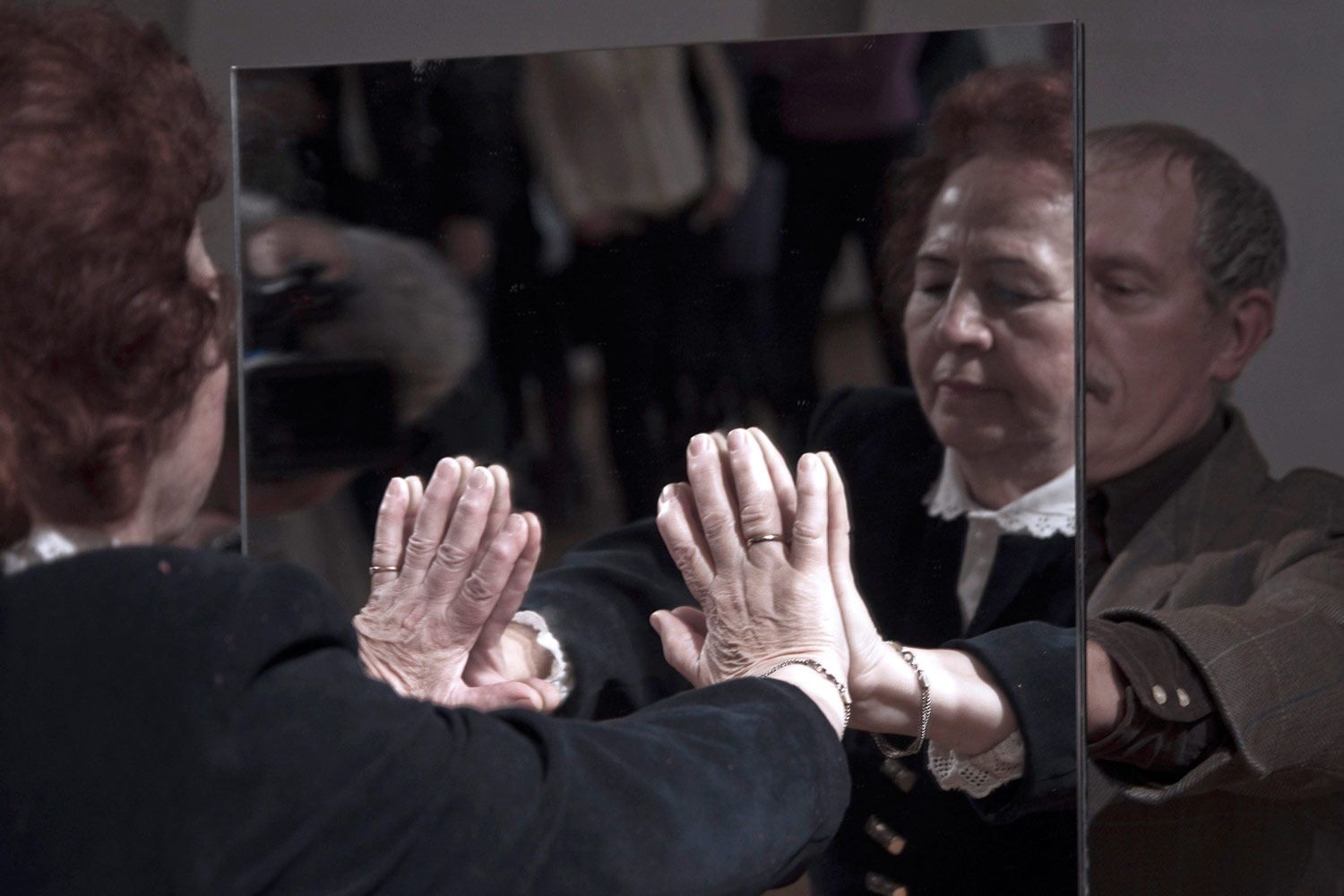 Bienale sztuki współczesnej, Moskwa, Rosja 2009